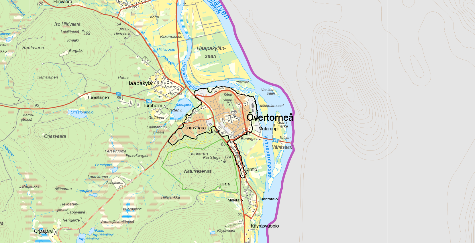 Tätorten Övertorneå med gränserna från Statistiska centralbyråns tätortsavgränsning 2015. Bakgrundskarta från Lantmäteriet, skala 1:30 236.